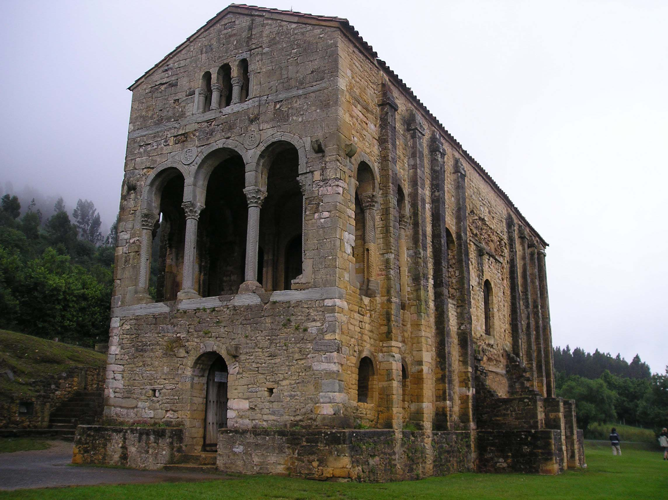 Santa María del Naranco (Oviedo, Asturias).